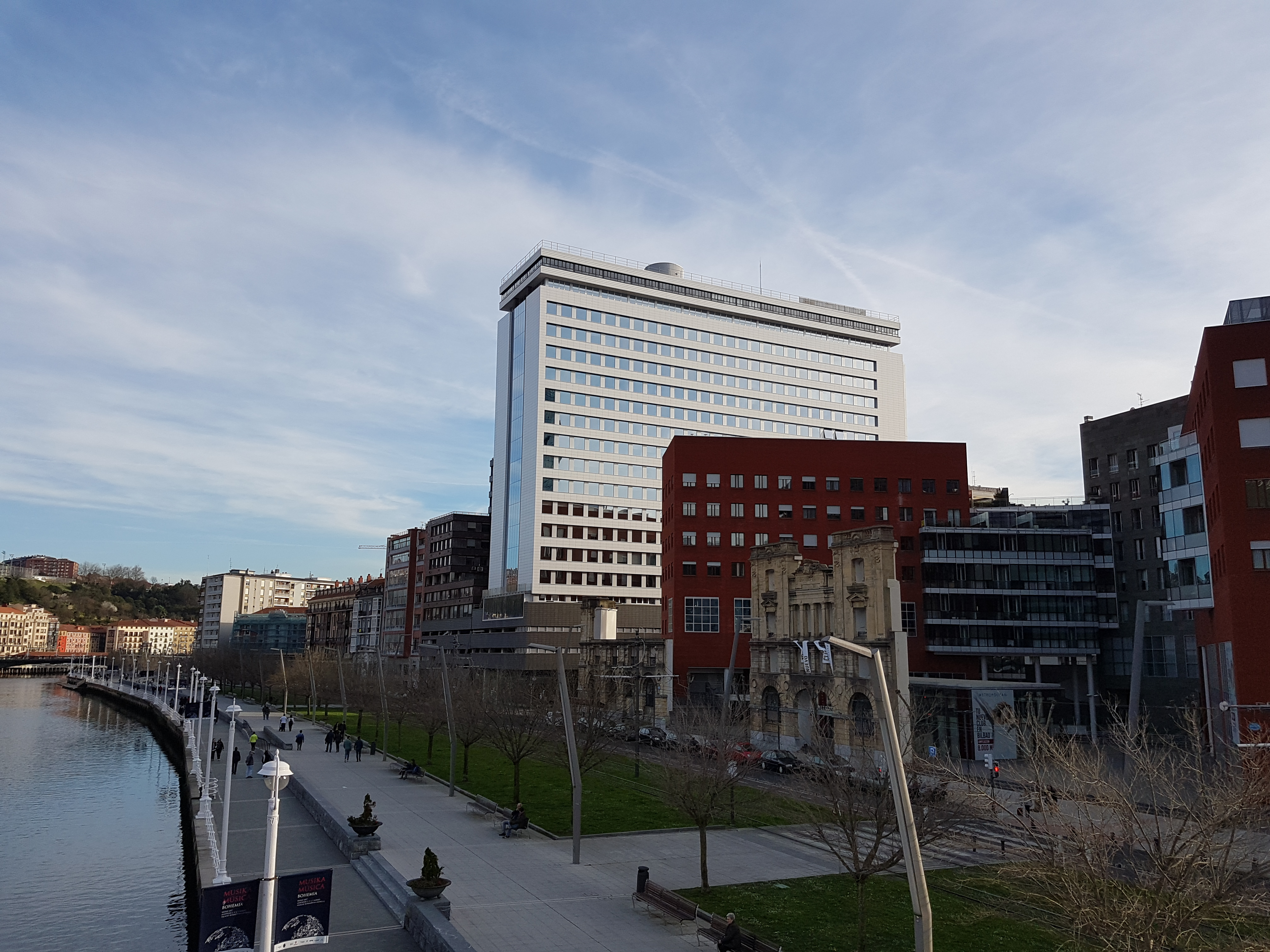 Edificio Albia remodelado.